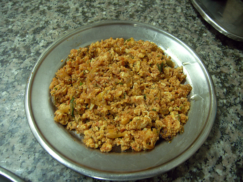 Schakschuka